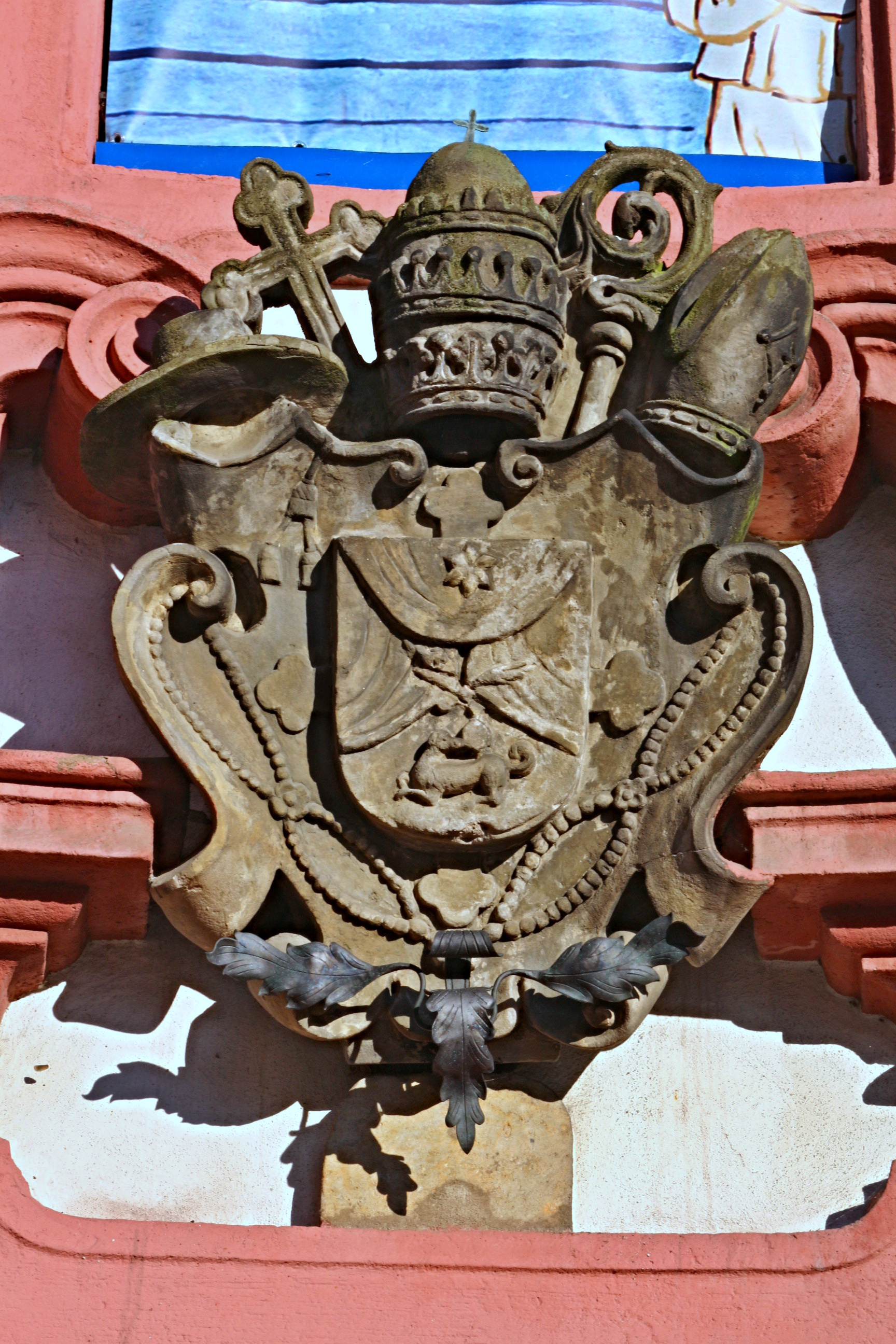 Dominikánský klášter v Jablonném v Podještědí